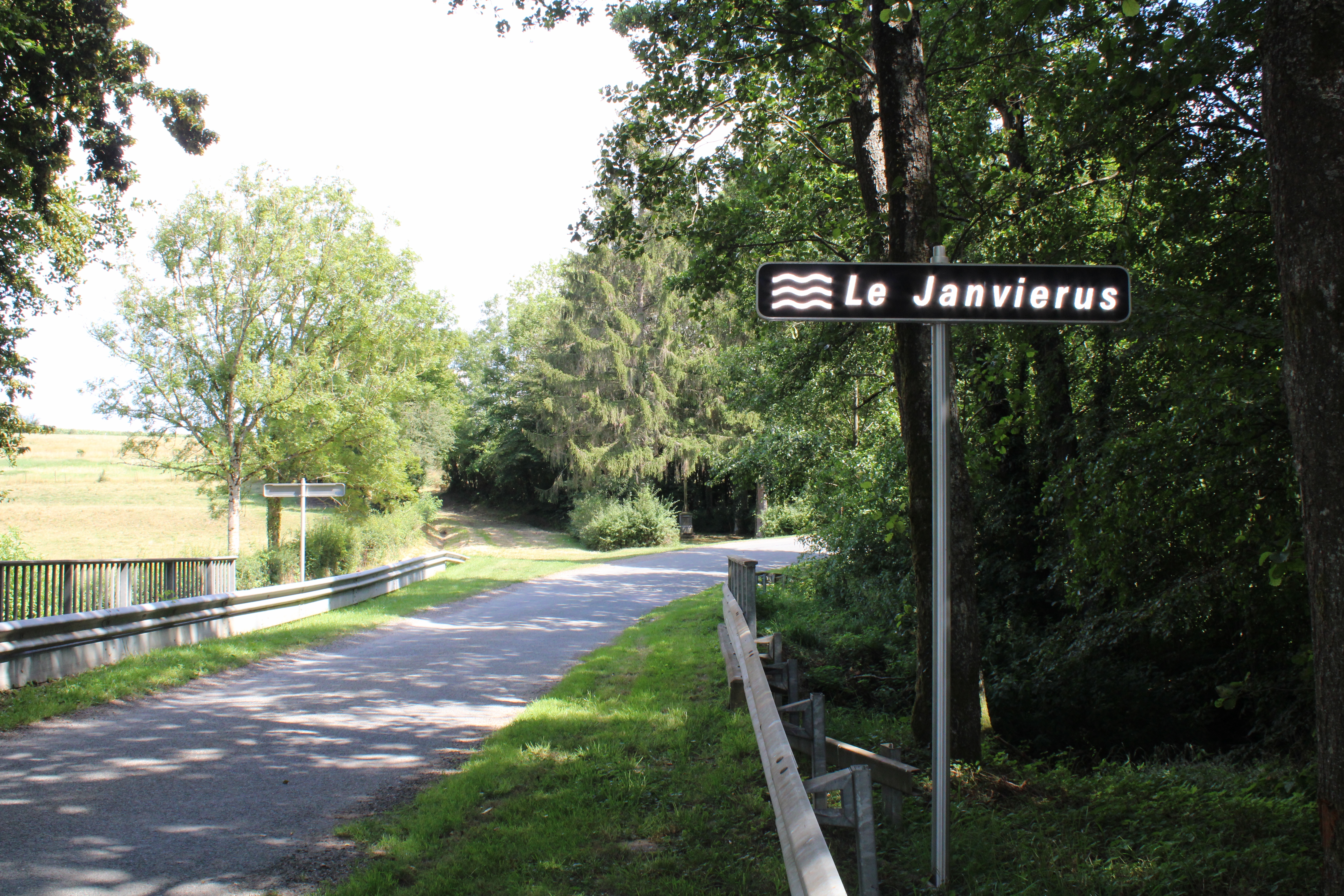 Le Janvierus